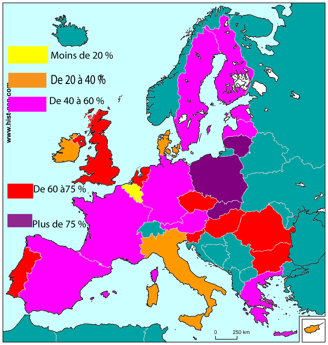 Carte de l'abstention aux élections européennes de juin 2009. Carte faite pour un exposé sur l'UE (en 1ere), légende rajouté sur la carte pour l'importion sur WP.